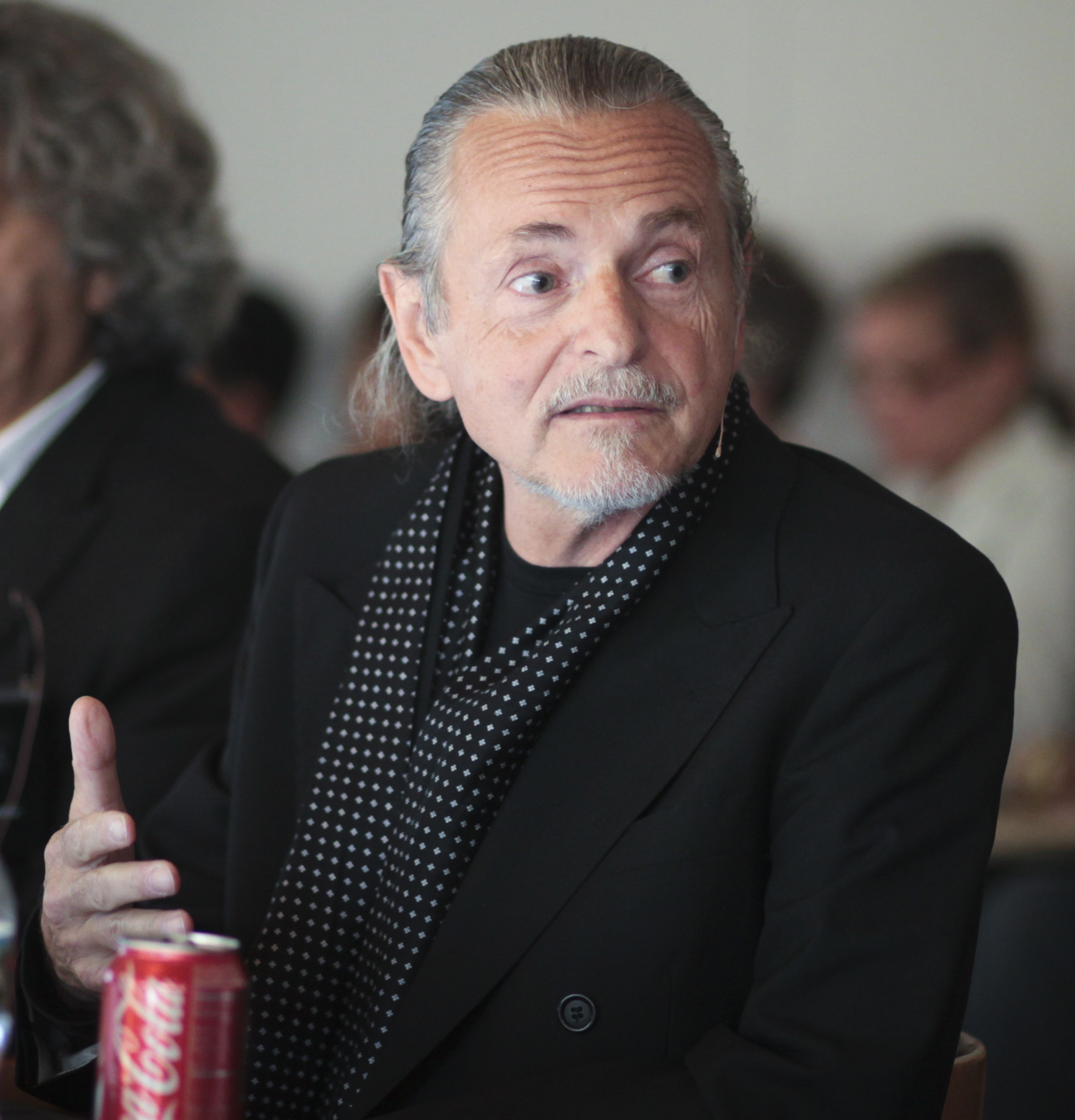 Krzysztof Wodiczko at Harvard GSD talk September 2009